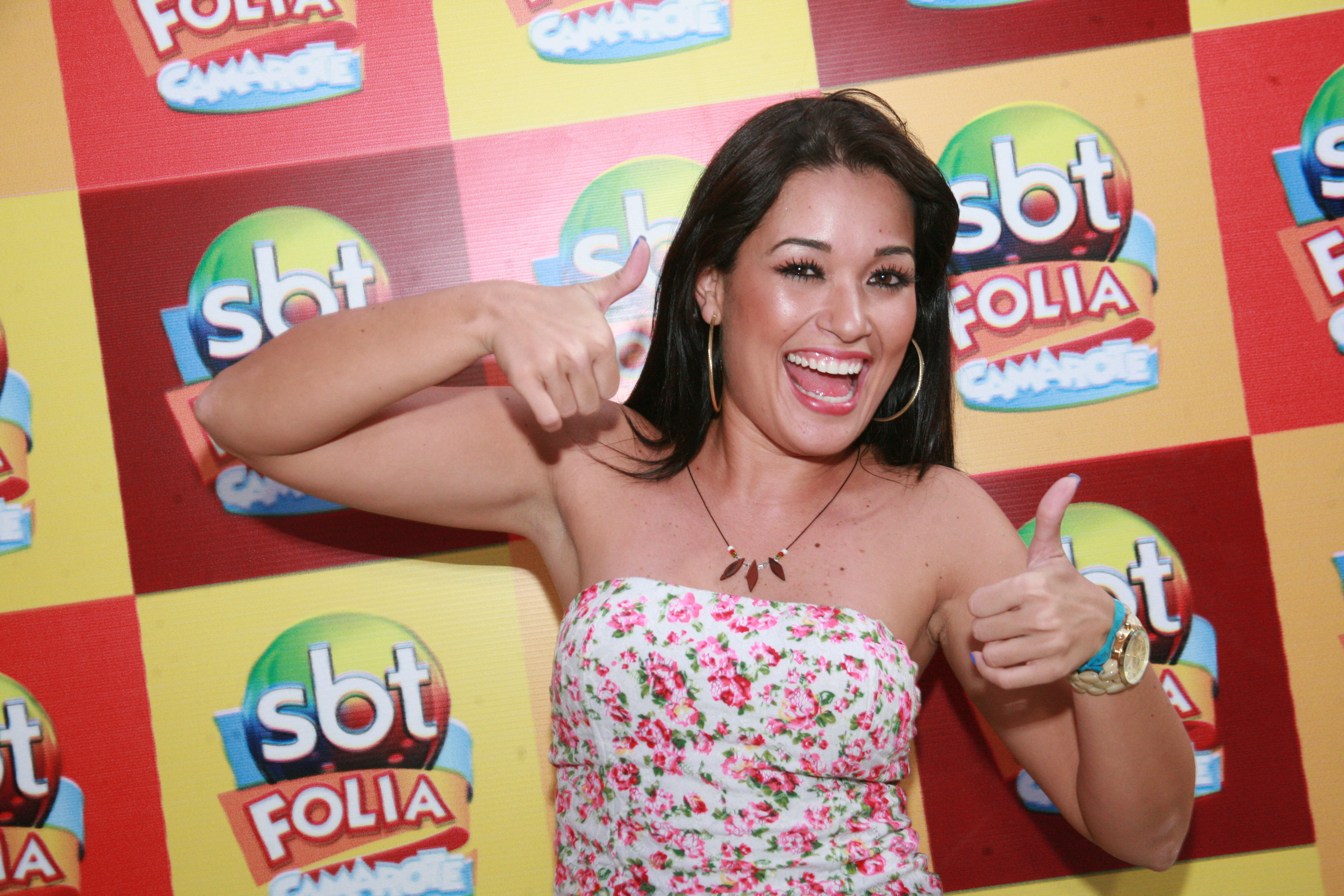 Dancarina Milene Uehara